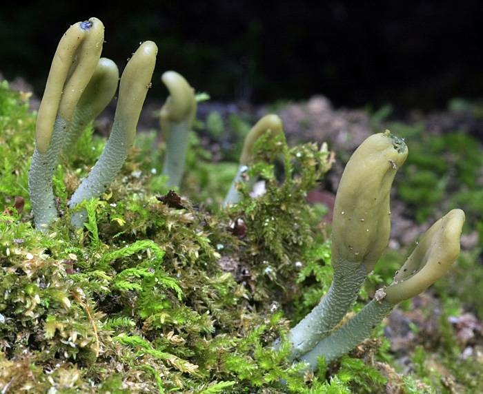 Microglossum viride (Schrad.) Gillet